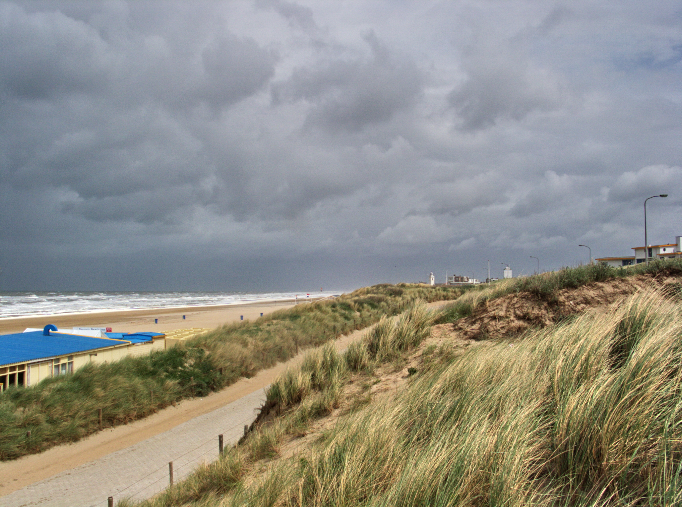 katwijk (4)